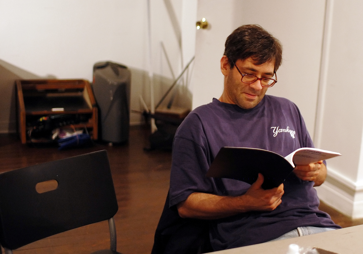 Gordon Van Gelder, 2008